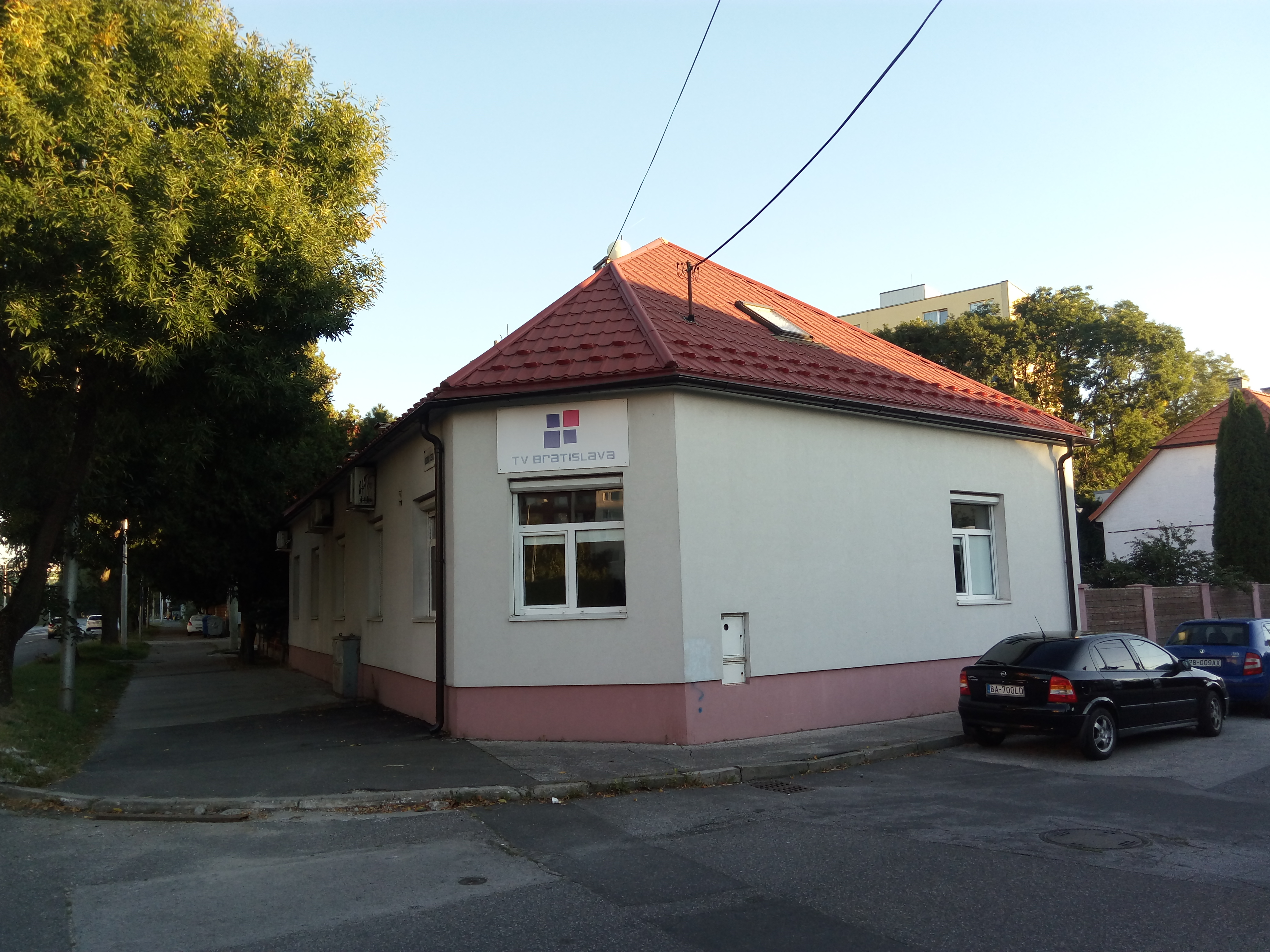 Prokopova 1, Petržalka, Bratislava